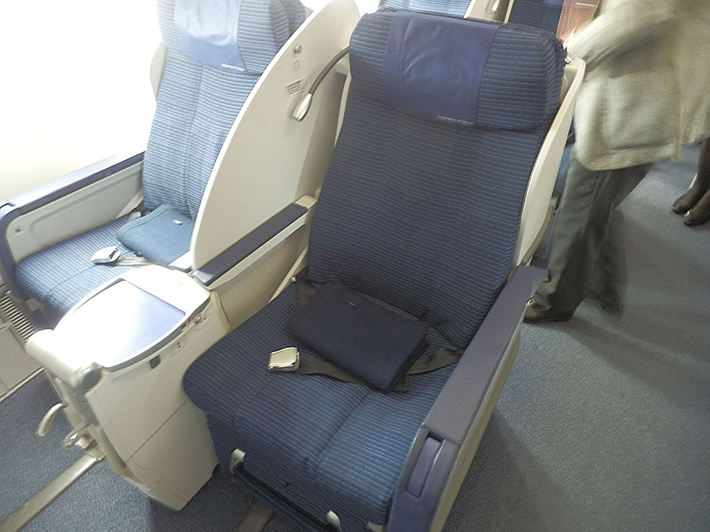 ana premiumclass